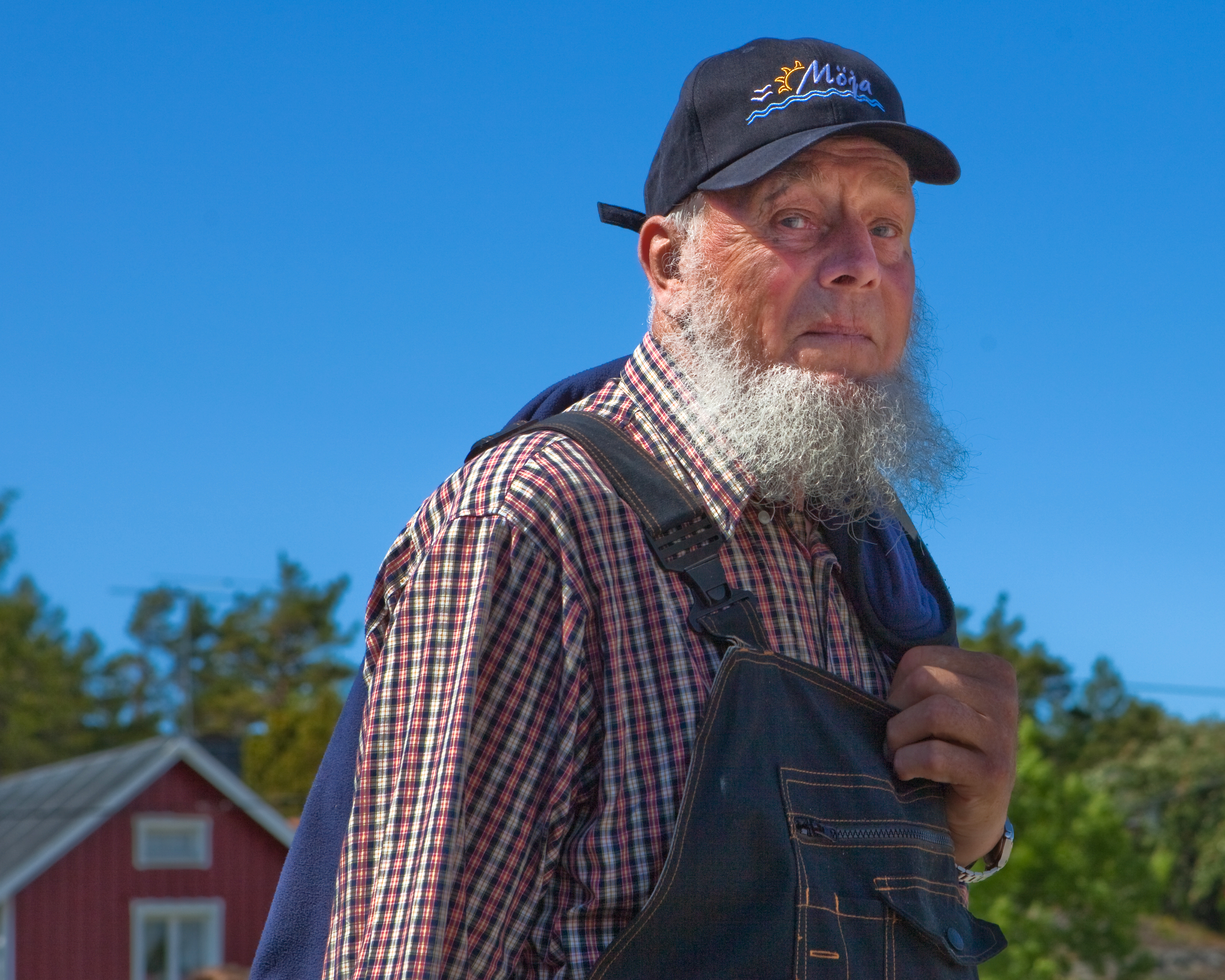 Midsummer Möja 2010